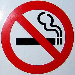 Bearbeitet von Zubi 23:09, 13. Jan 2006 (CET) Original ist hier zu finden